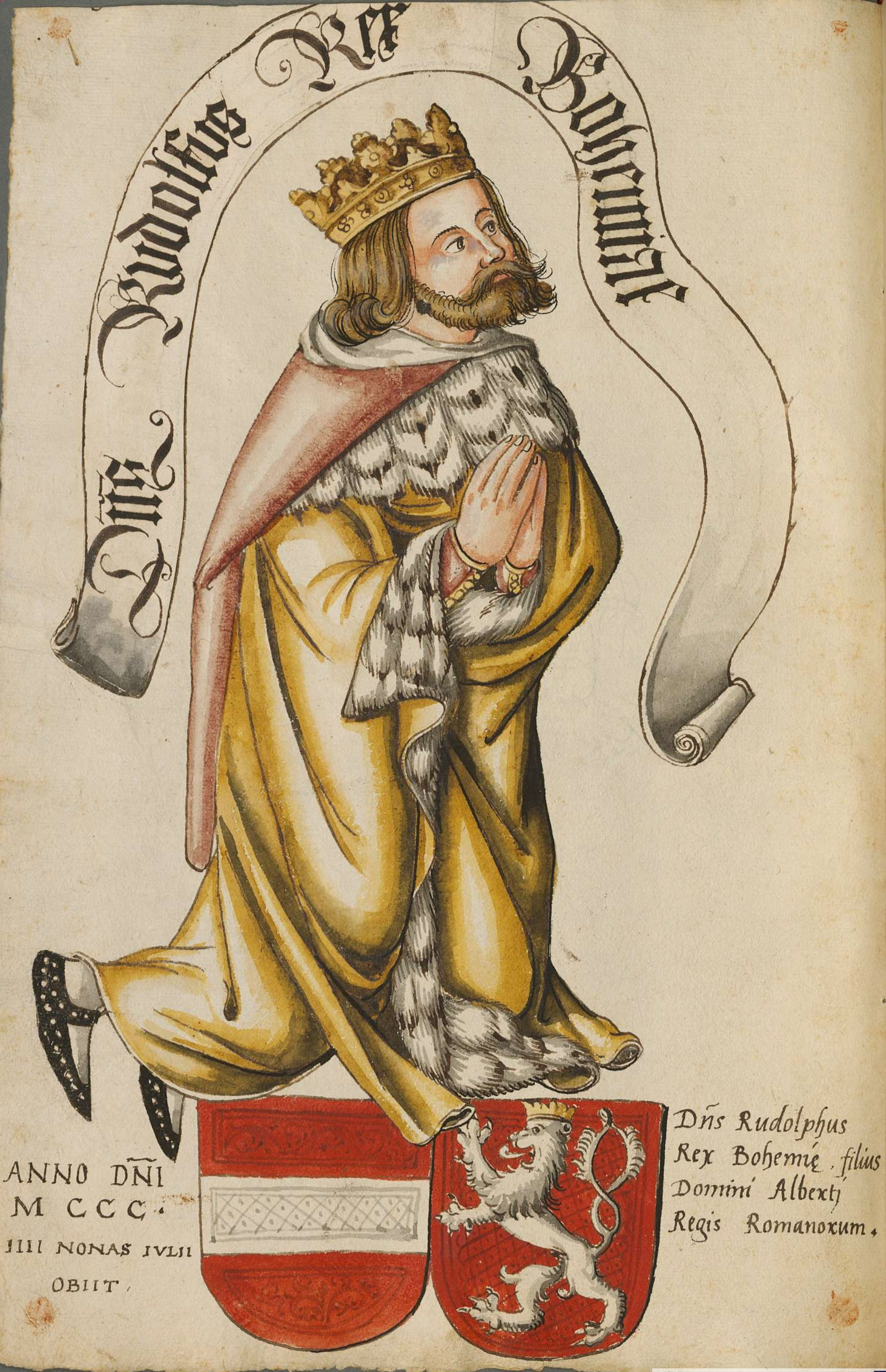 Fürstenbildnisse der Habsburger des 14. Jh. nach den Glasfenstern von Königsfelden/Aargau - BSB Cod.icon. 330 [S.l.] Nordschweiz (Bern ?) um 1560 fol. 15v: Rudolf I., König von Böhmen